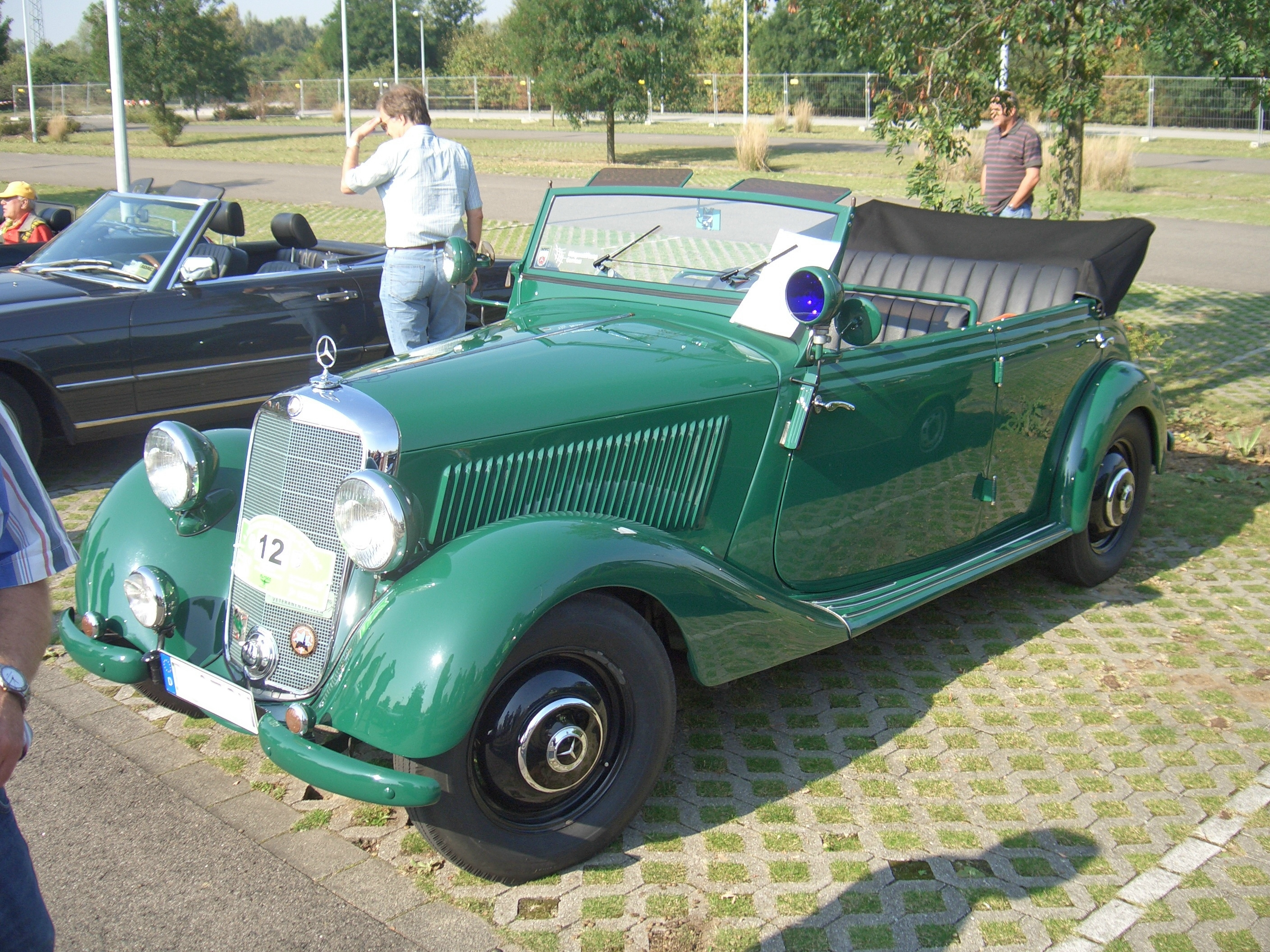 Mercedes-Benz Da 170 (W136) OTP (offener Tourenwagen Polizei), 1951-1952